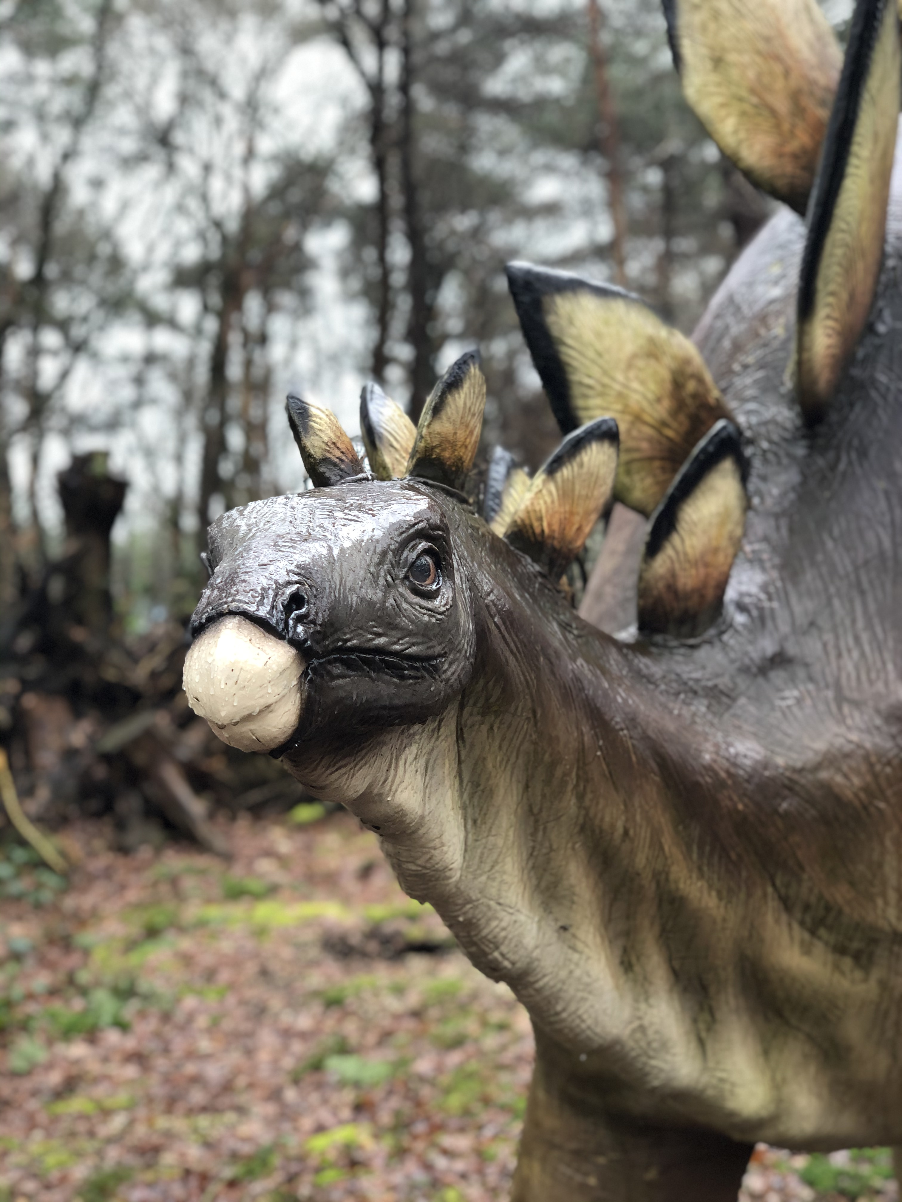 Portet van een Stegosaurus in het DinoPark van DierenPark Amersfoort.